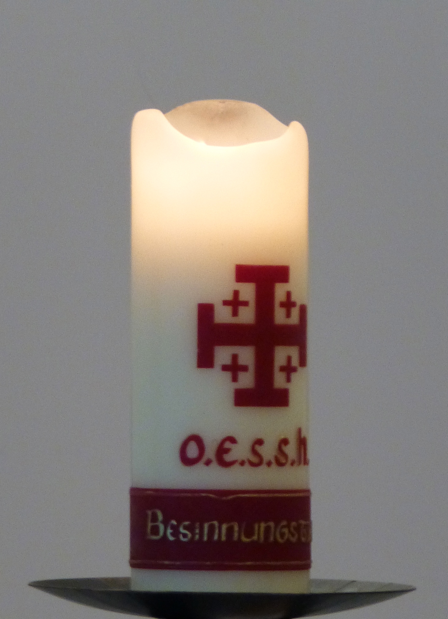 Kerze mit Jerusalemkreuz (Ritterorden vom Heiligen Grab zu Jerusalem)